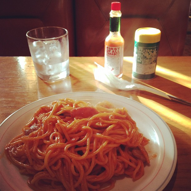 Naporitan